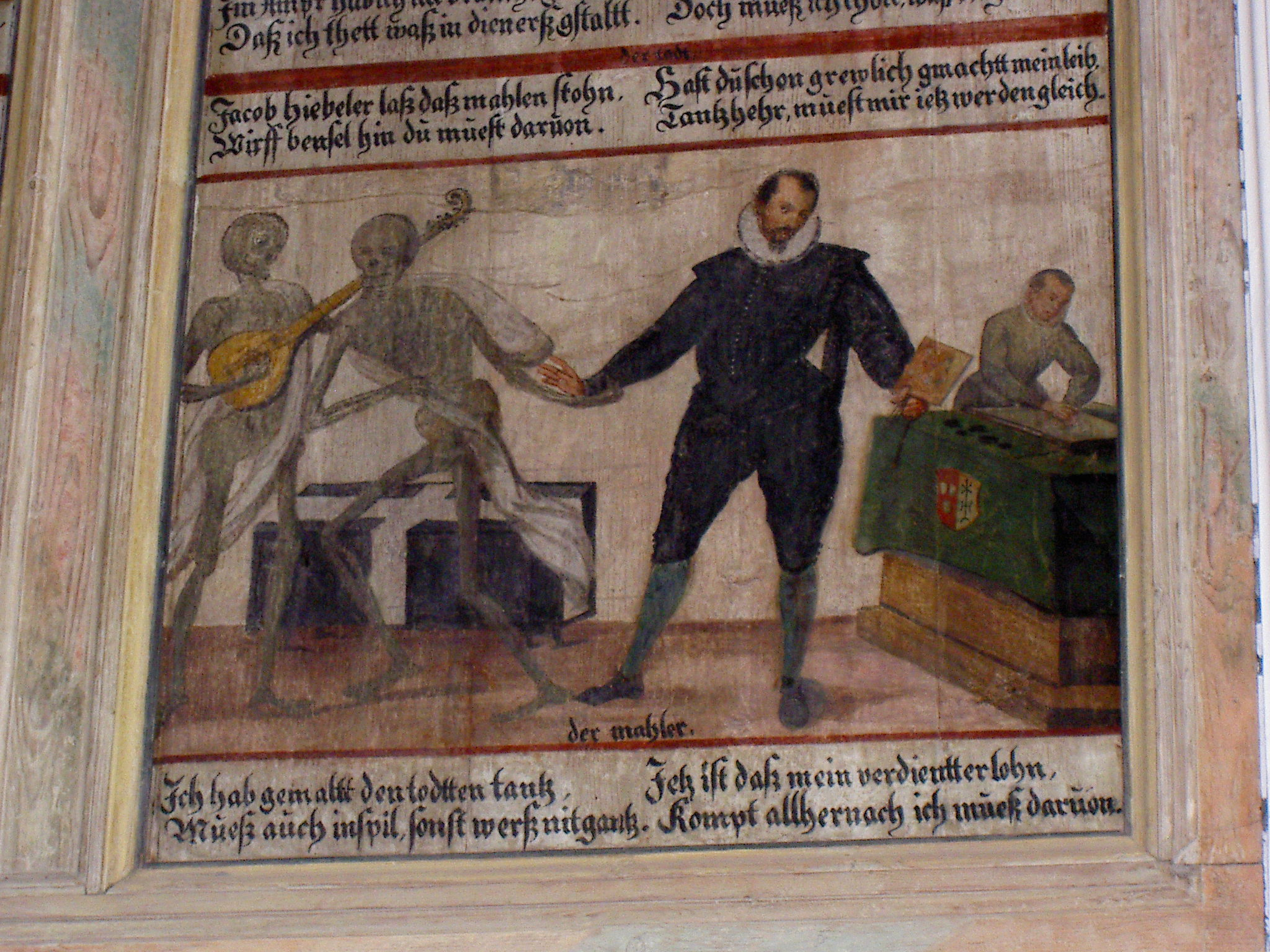 Letztes Bild des Füssener Totentanzes